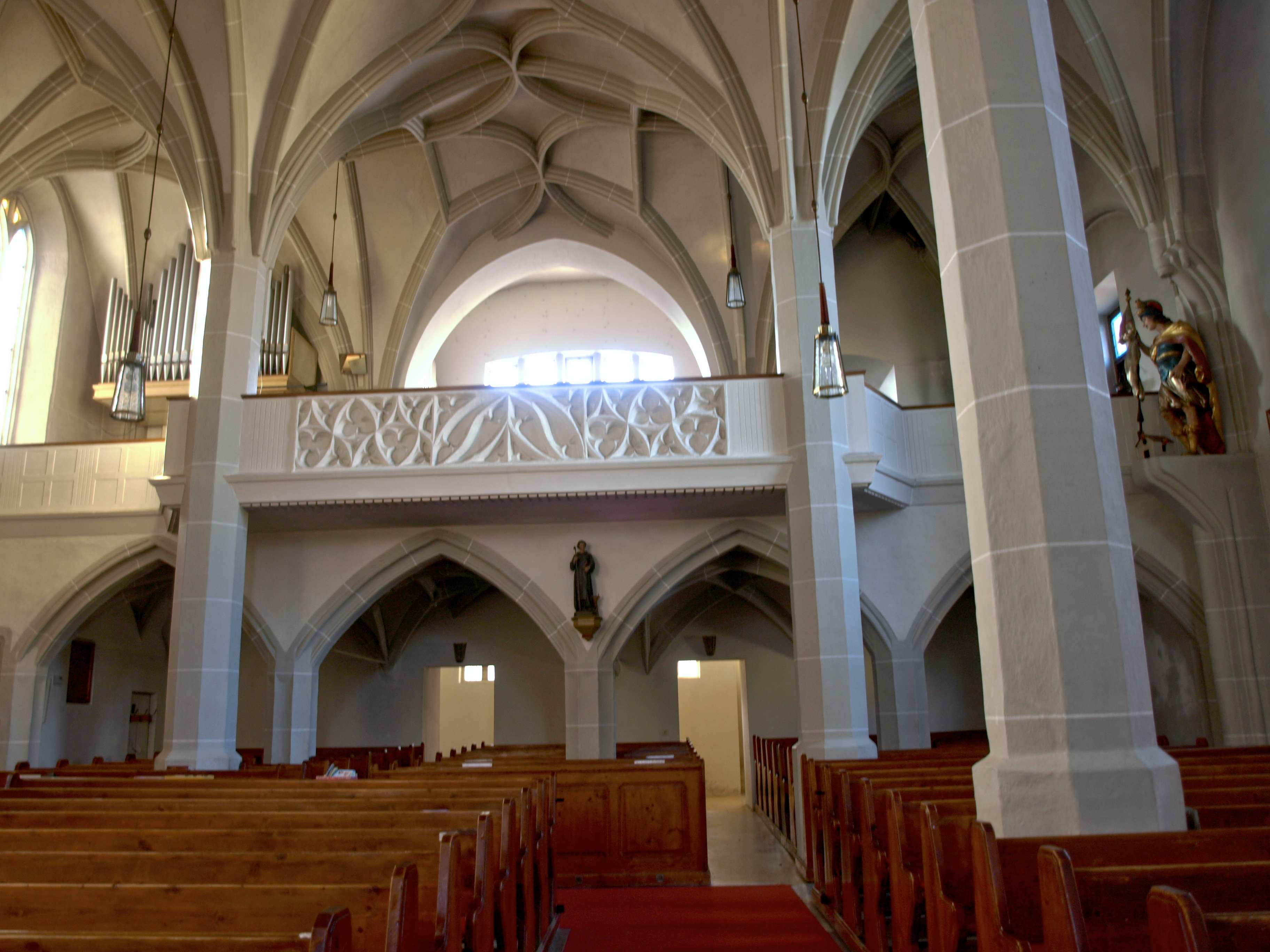 Kath. Pfarrkirche hl. Jakobus der Ältere